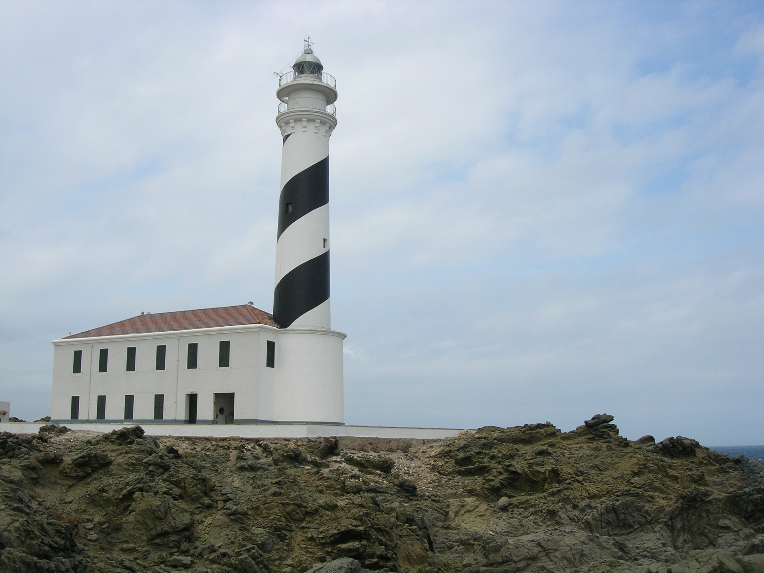 Parc Natural de s'Albufera des Grau This is a a photo of a natural area in the Balearic Islands, Spain, with id: ES530004